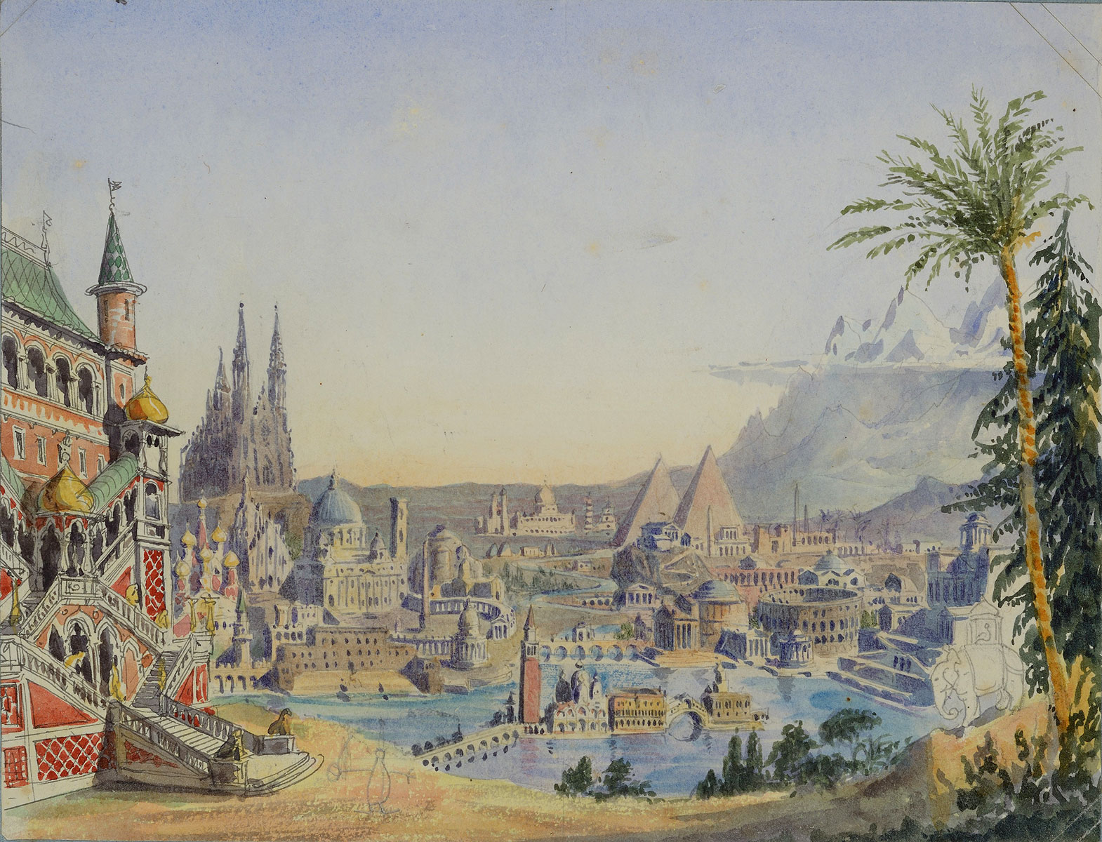 Архитектурная фантазия с изображением крупнейших памятников мировой архитектуры. Акварель. 1841—1846 годы.